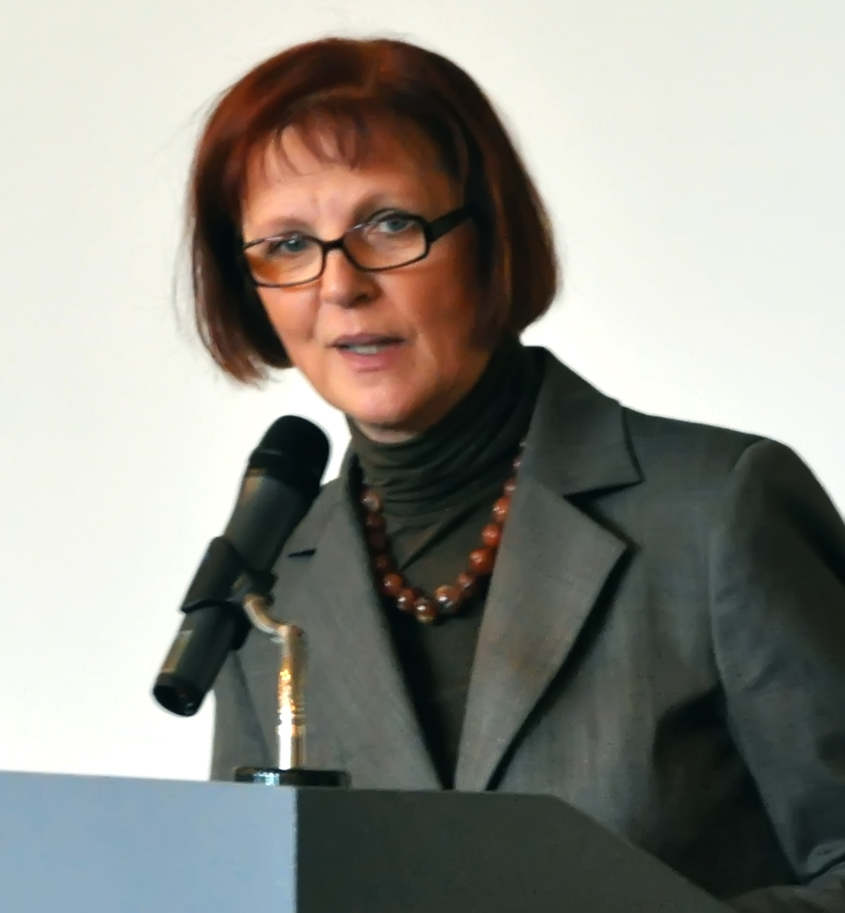 Gabriele Schopenhauer, Stadtpräsidentin von Lübeck, beim Grußwort während der Nordelbischen Synode vom 5.–6. Juni 2009 der Nordelbischen Kirche in Lübeck, Deutschland. (Foto: Pittkowski)